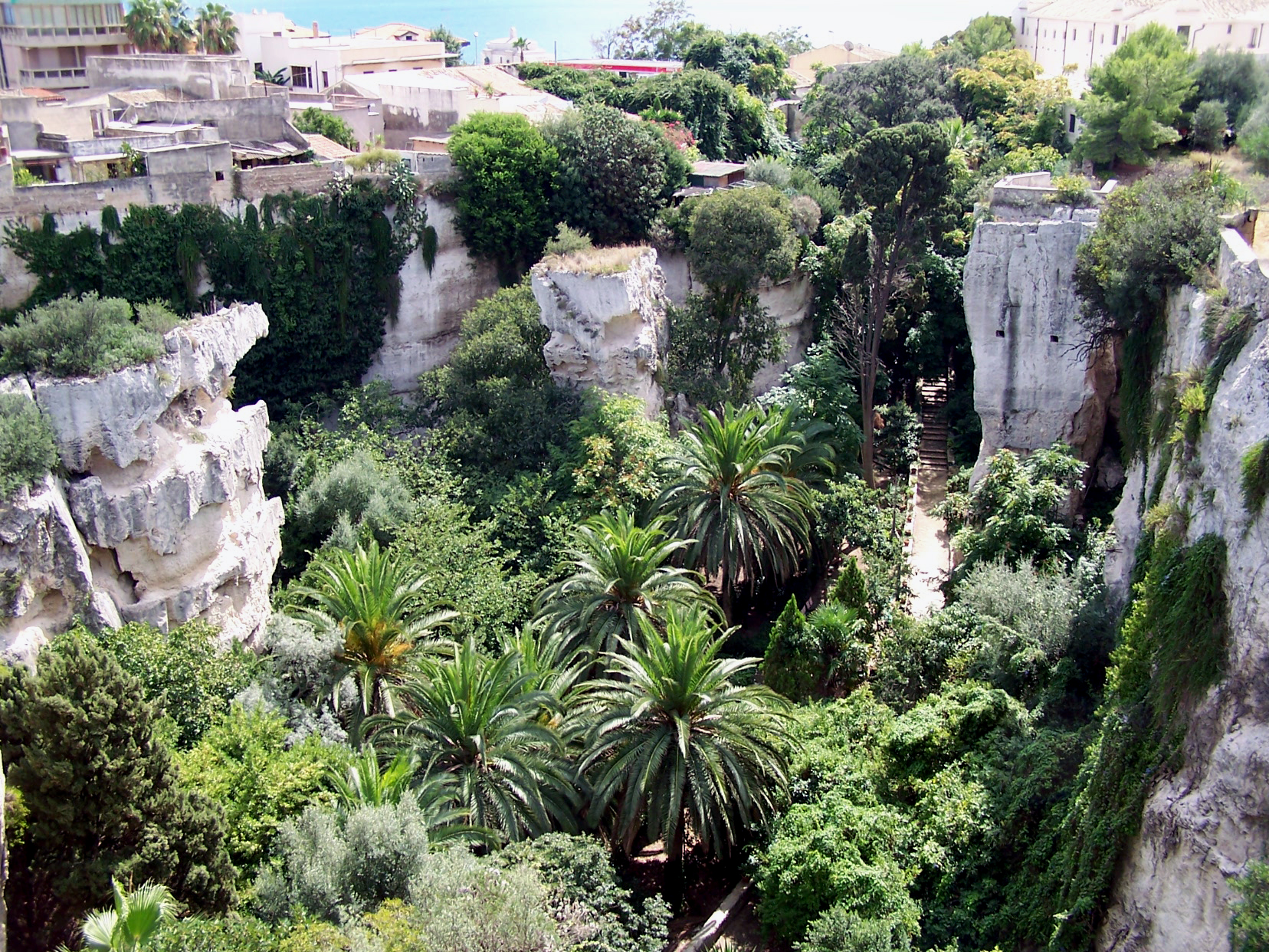 La "Latomia dei Cappuccini a Siracusa, vista dall'alto.